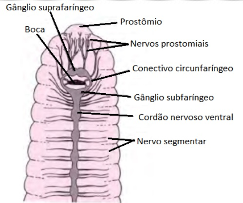 sistema nervoso dorsal de minhoca